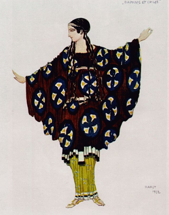 bakst daphnis et chloe costume 1912